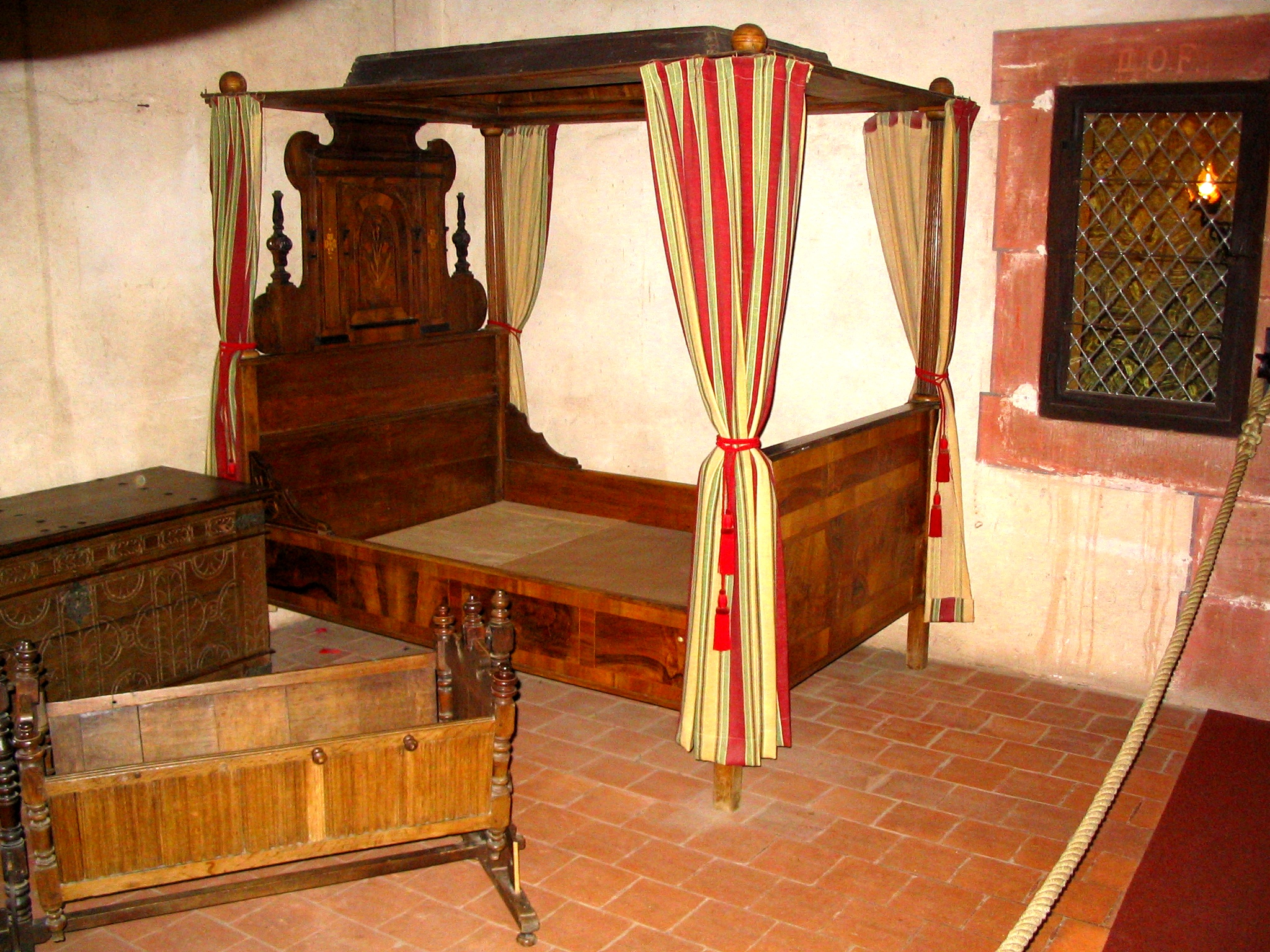 Gemach auf der Hohkönigsburg (Haut-Kœnigsbourg)